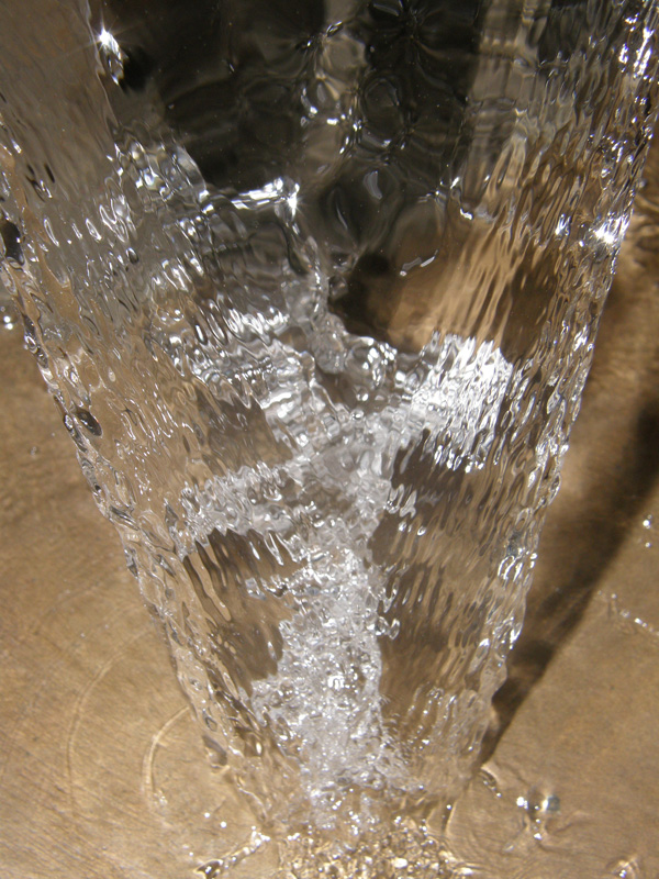 Wasser in Nürnberg